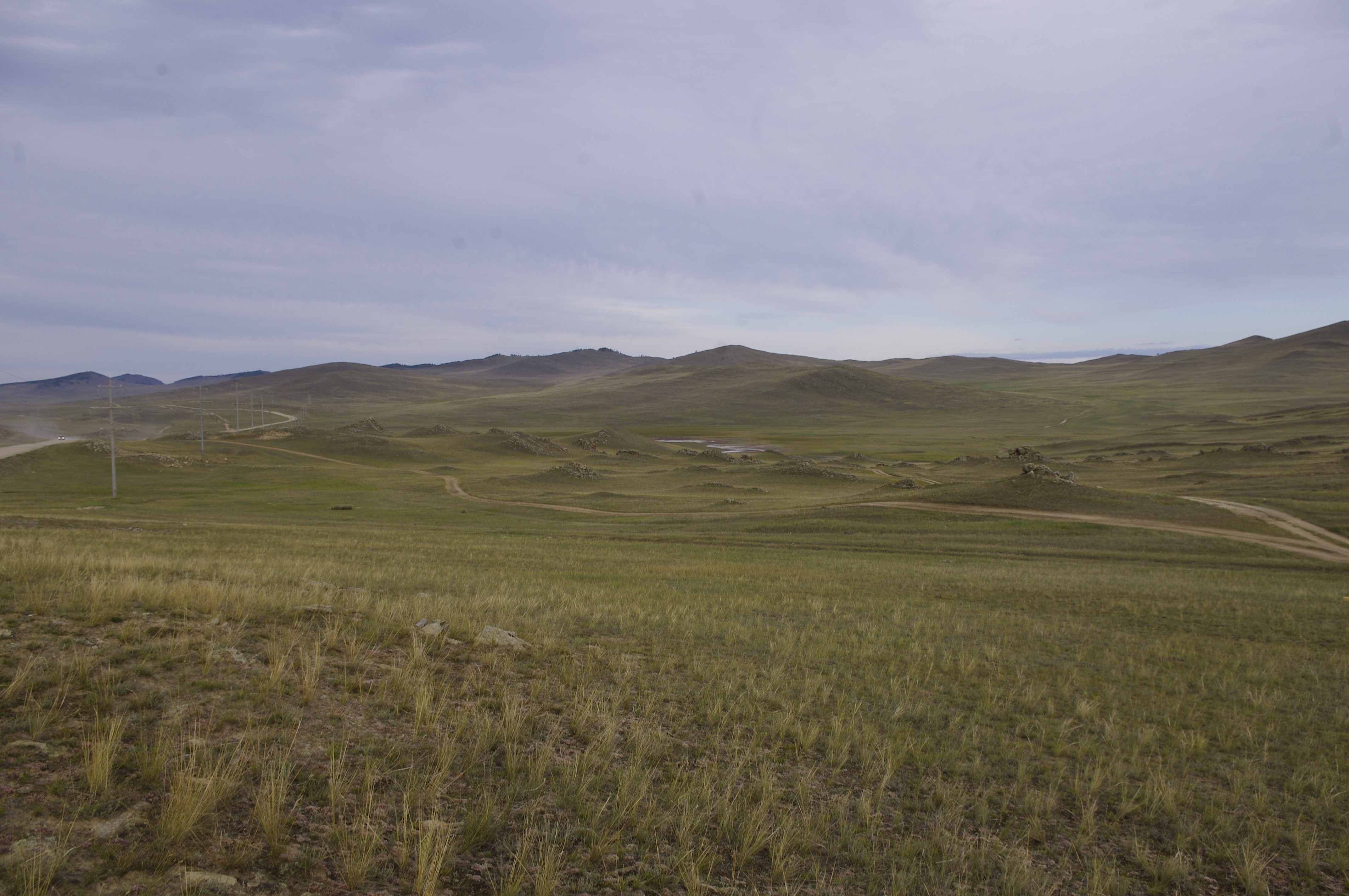 Lato 2013.